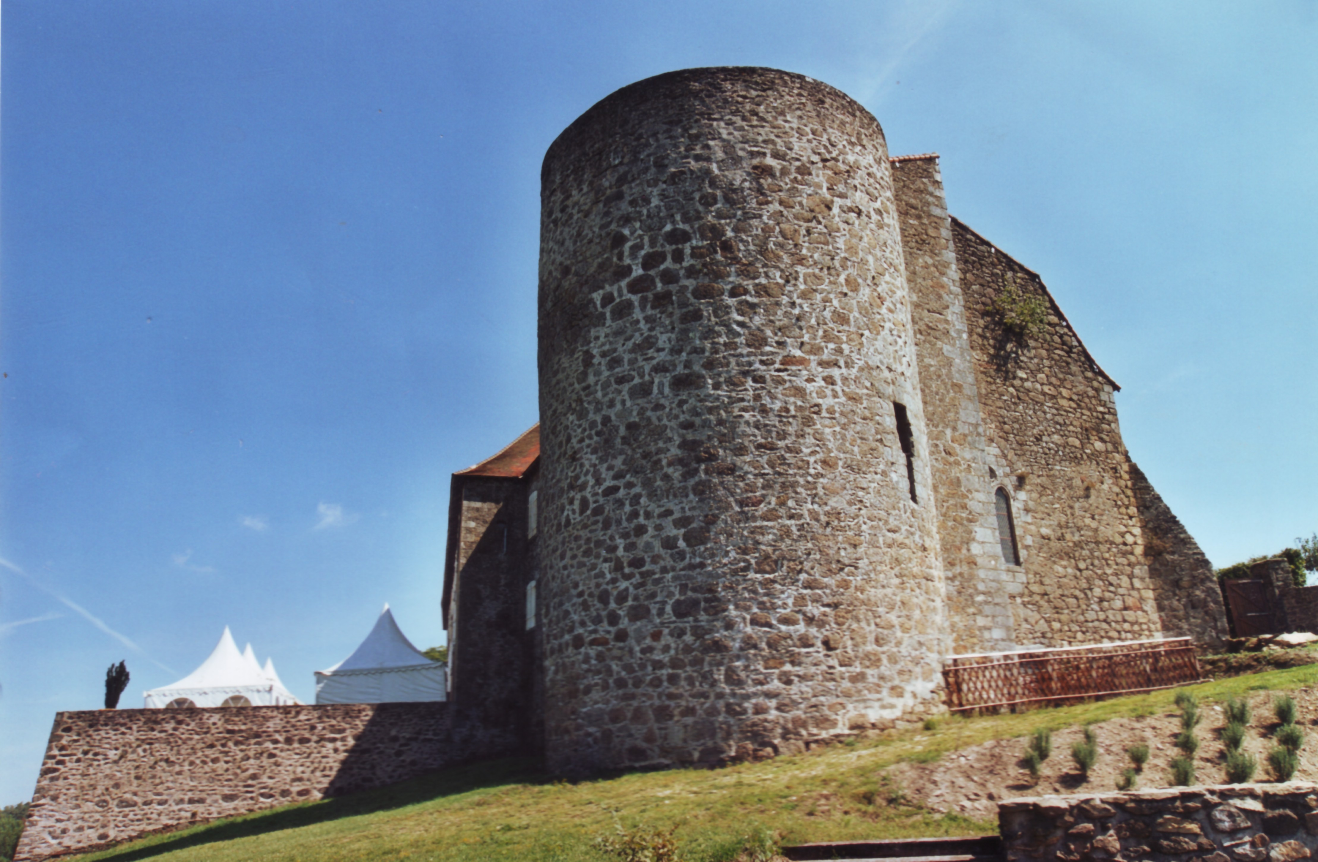 vue sur la tour d'angle du château de Châlus Chabrol